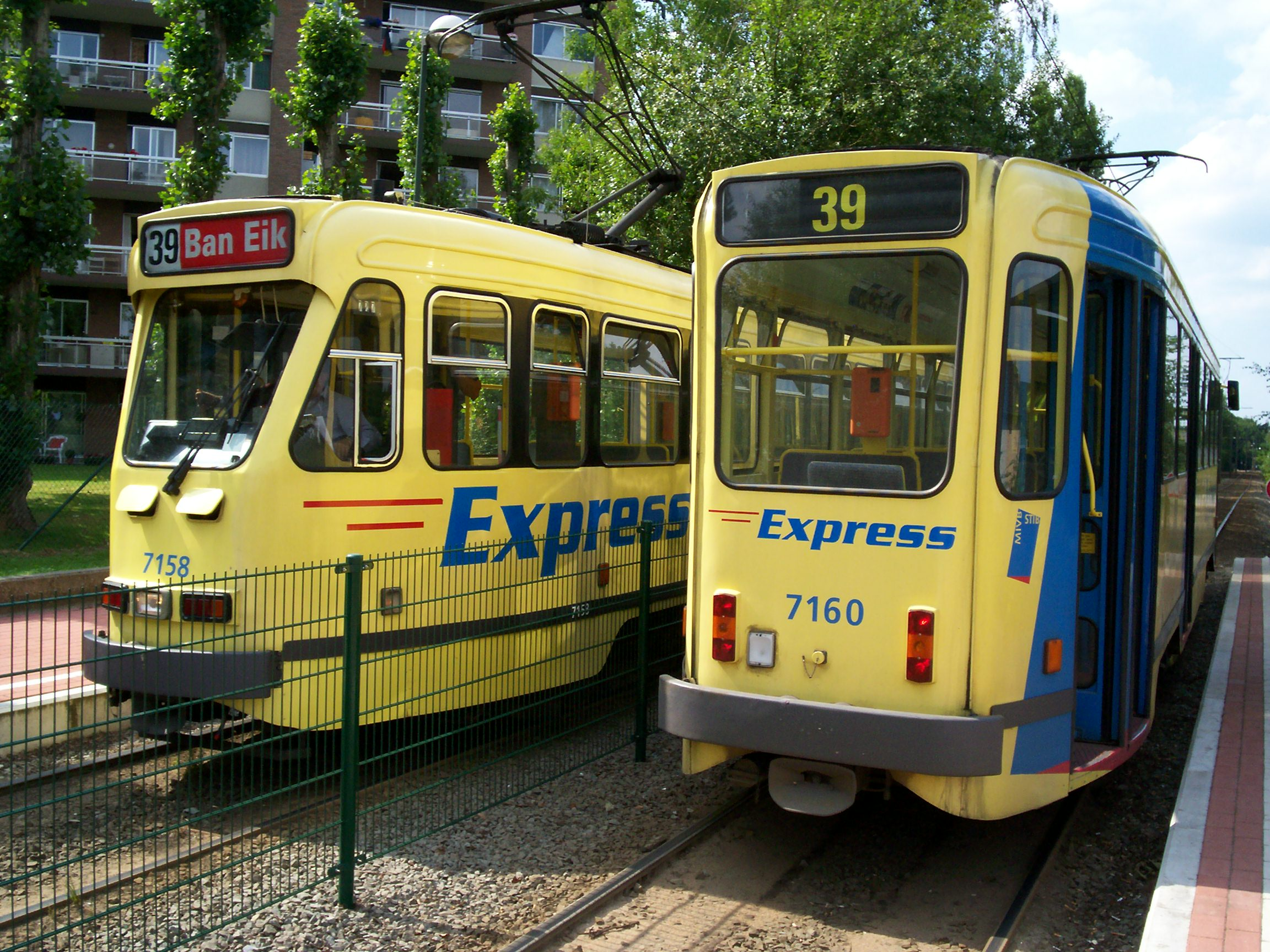 Croisement de deux trams de type 7100 au terminus Ban Eik